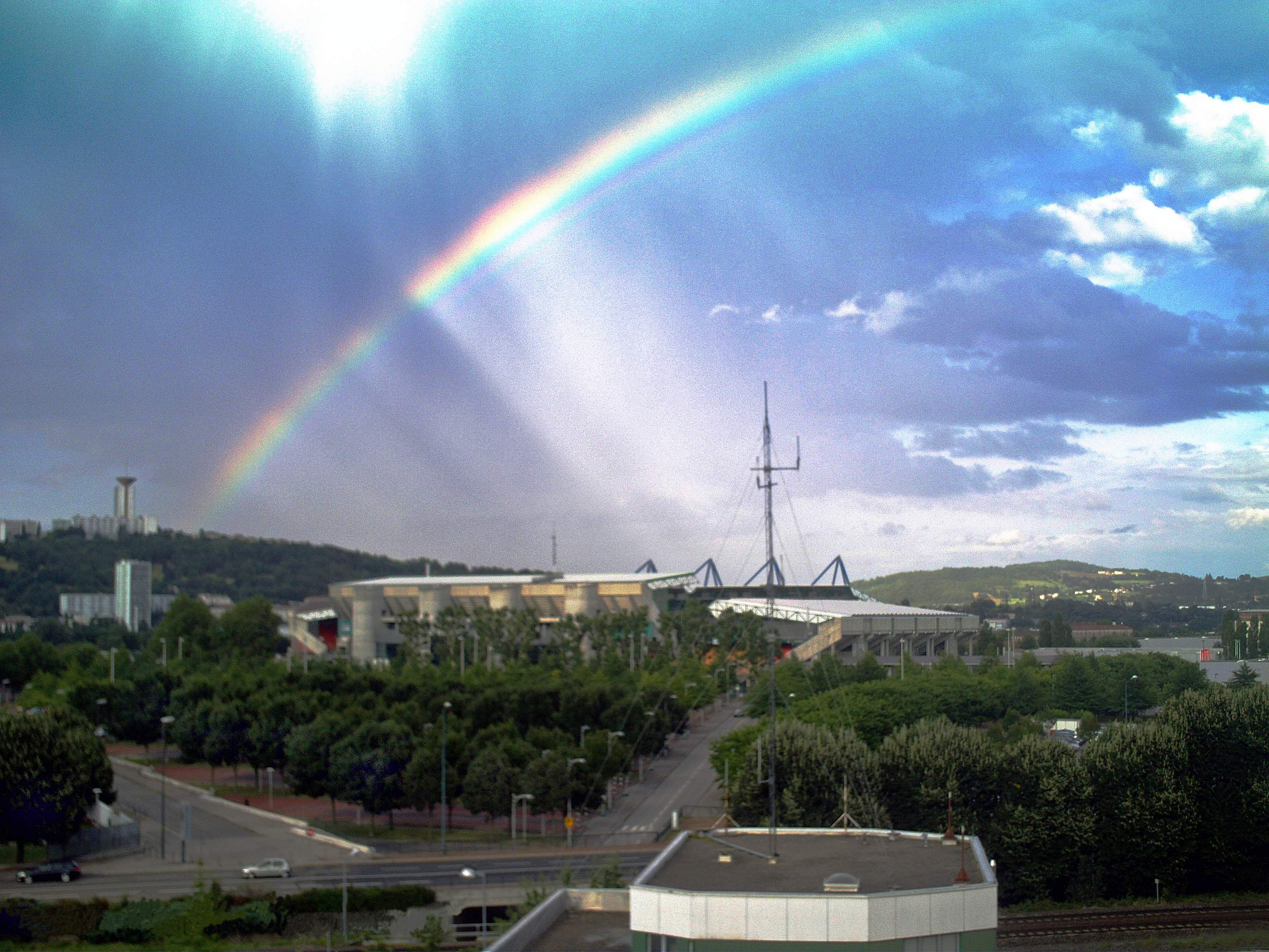 Vue sur le stade Geoffroy Guichard et sur La Tour Plein Ciel de Montreynaud.